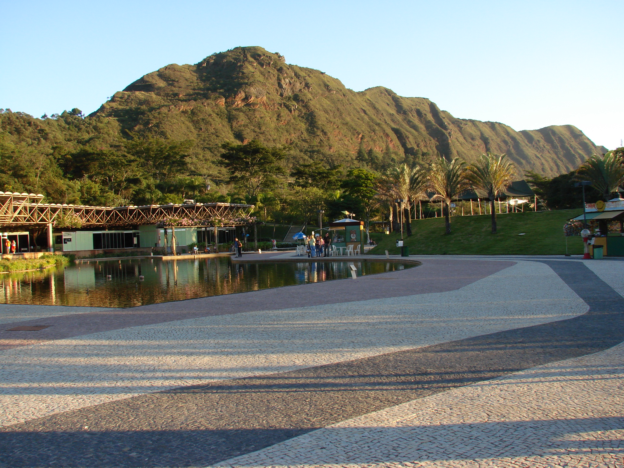 Serra do Curral vista de dentro do Parque das Mangabeiras, Belo Horizonte, Minas Gerais, Brasil